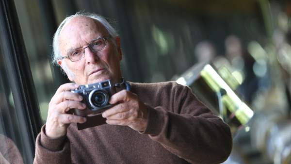 El director español Carlos Saura (2017)